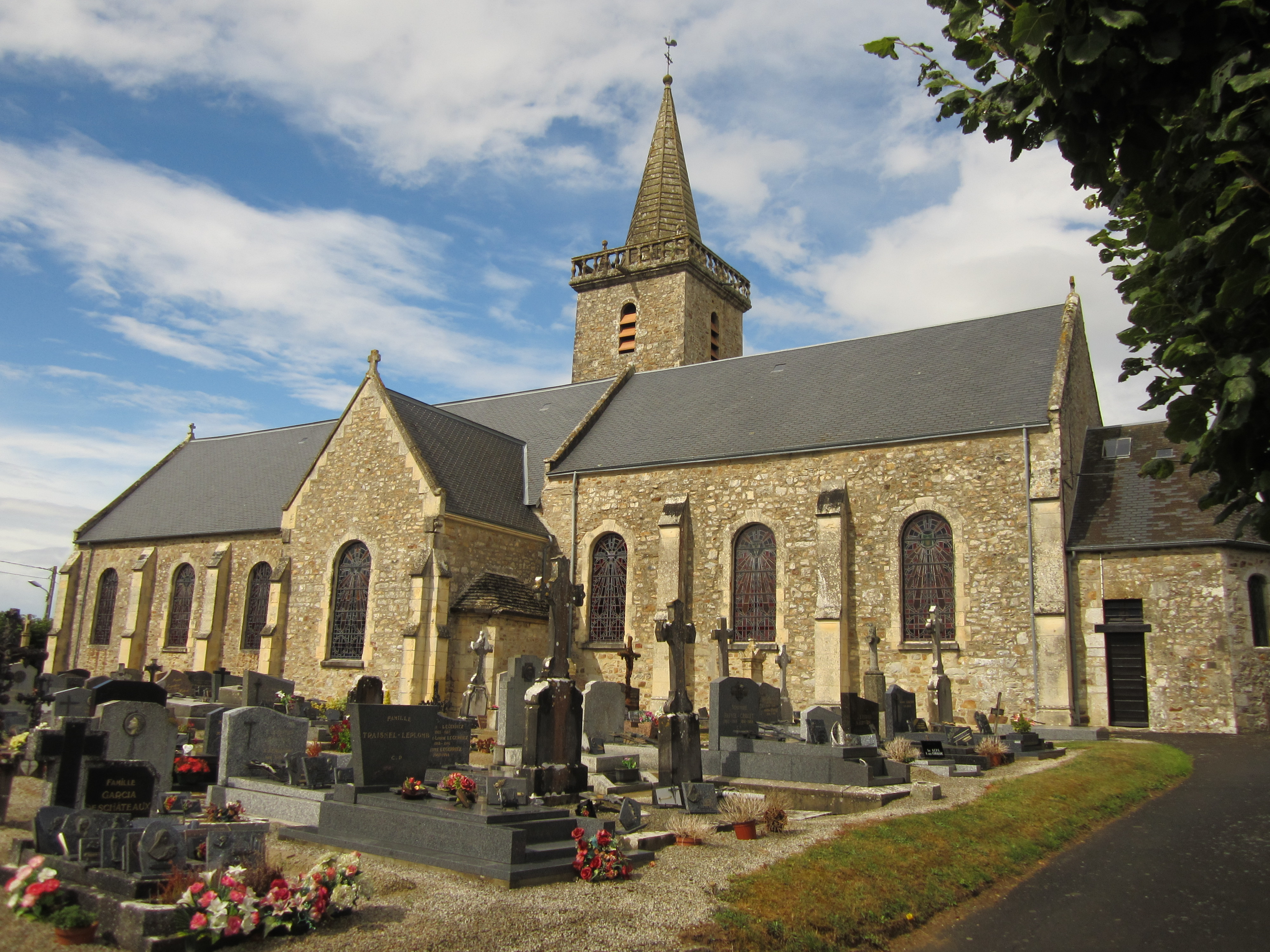 Varenguebec, Manche